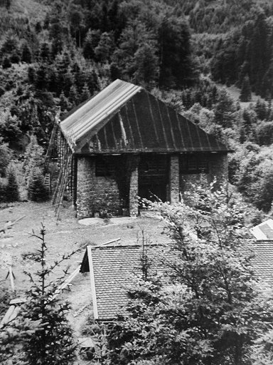 Stationsgebaeude Funkstation Herzogstand, Deutschland